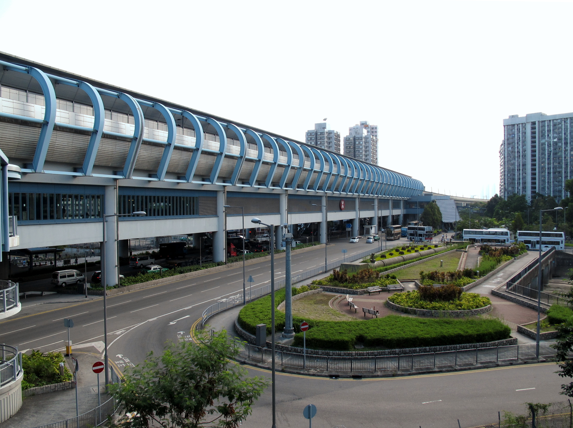 Long Ping Station 朗屏站